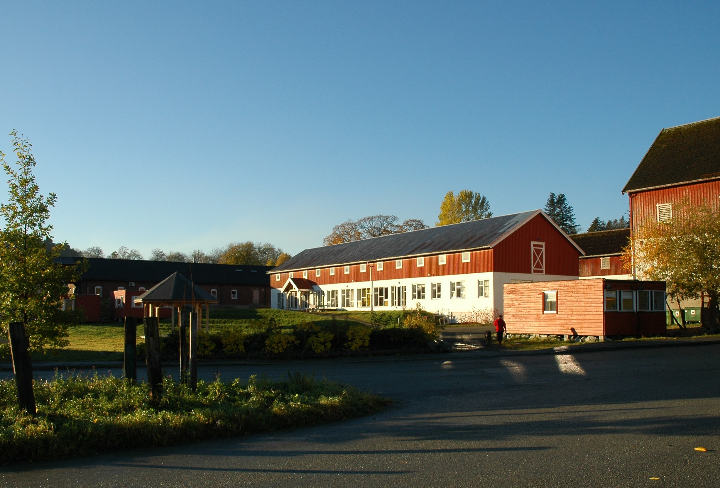 Rotvoll gård huser i dag Steinerskolen, Det Økologiske Hus og Kristoffertunet.